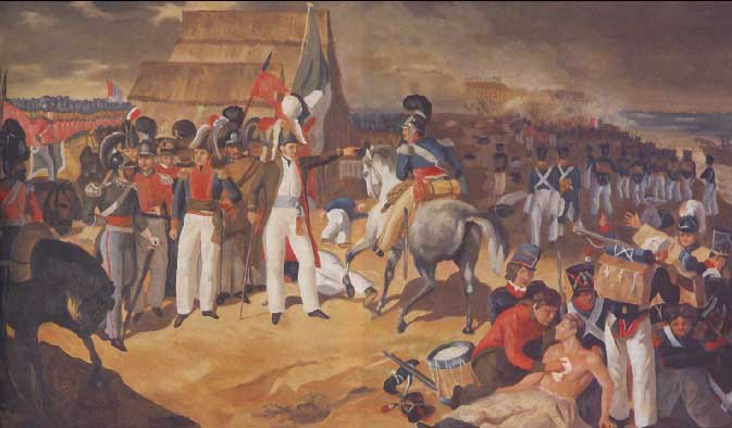 Capitulacion de la Batalla de Pueblo Viejo